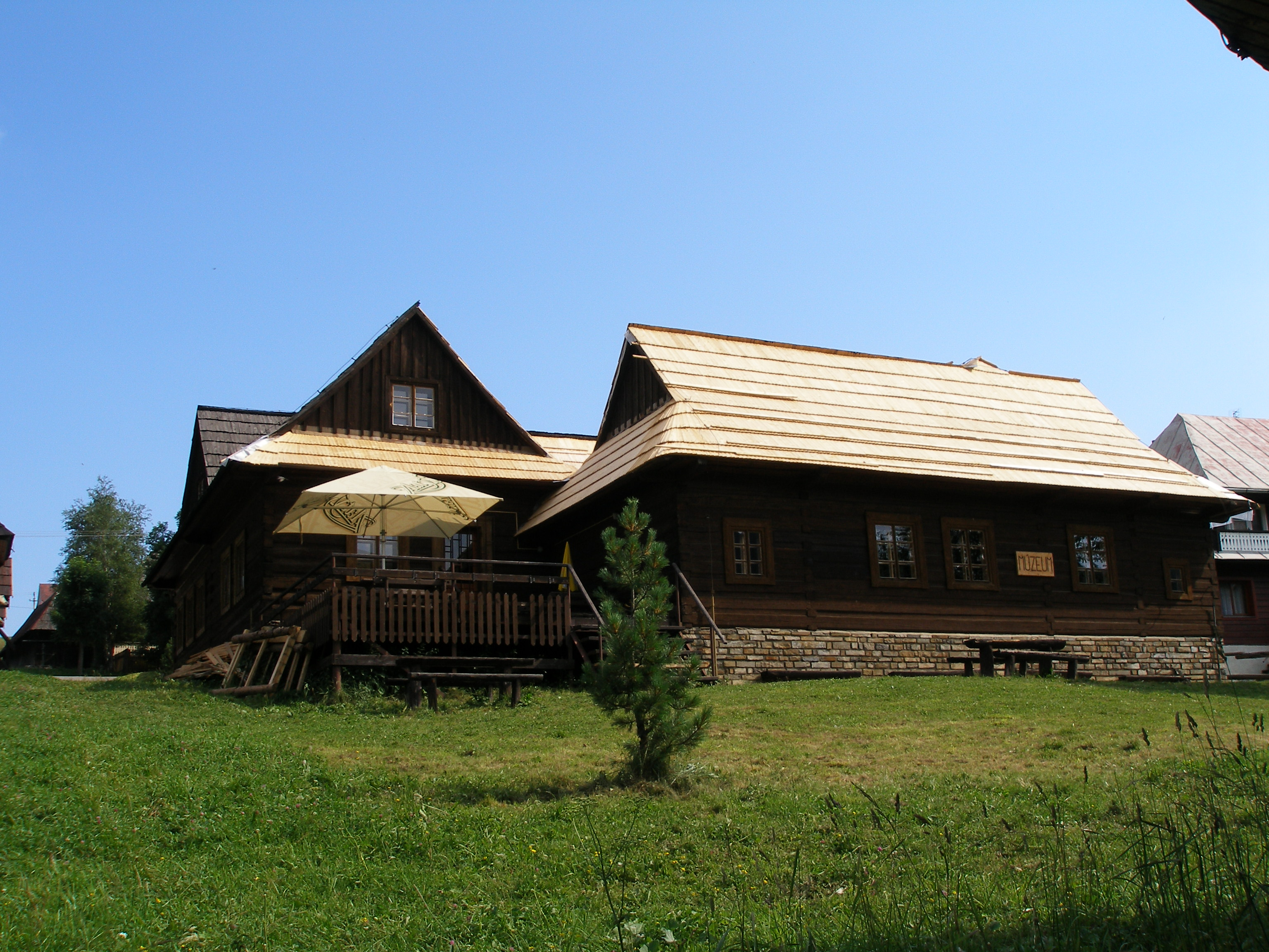 Podtatranská obec Ždiar, múzeum Ždiarsky dom.